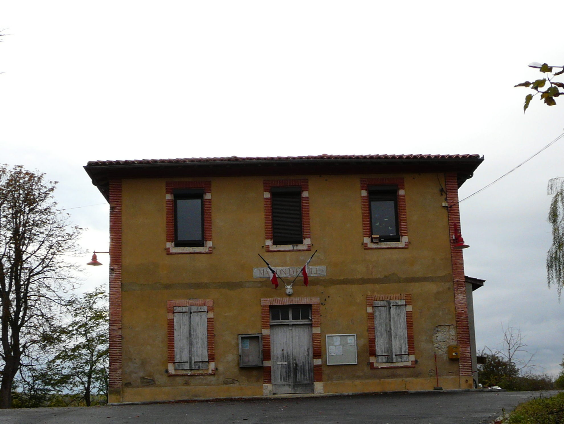 Mairie de Bax